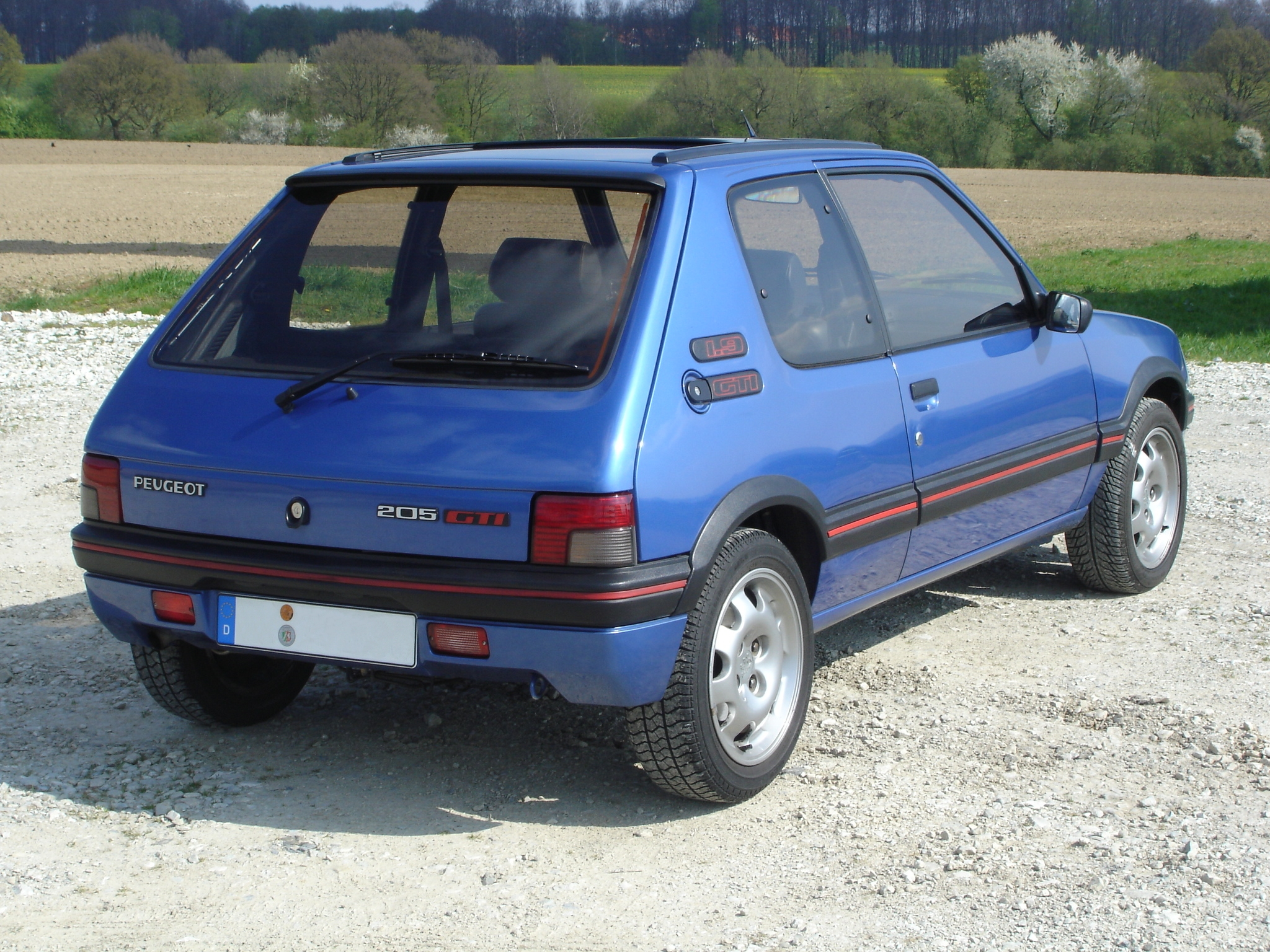 Peugeot 205 GTI 1.9l, 120 PS (mit Kat), Baujahr 1993, Kilometerstand bei dieser Aufnahme: 40.000km